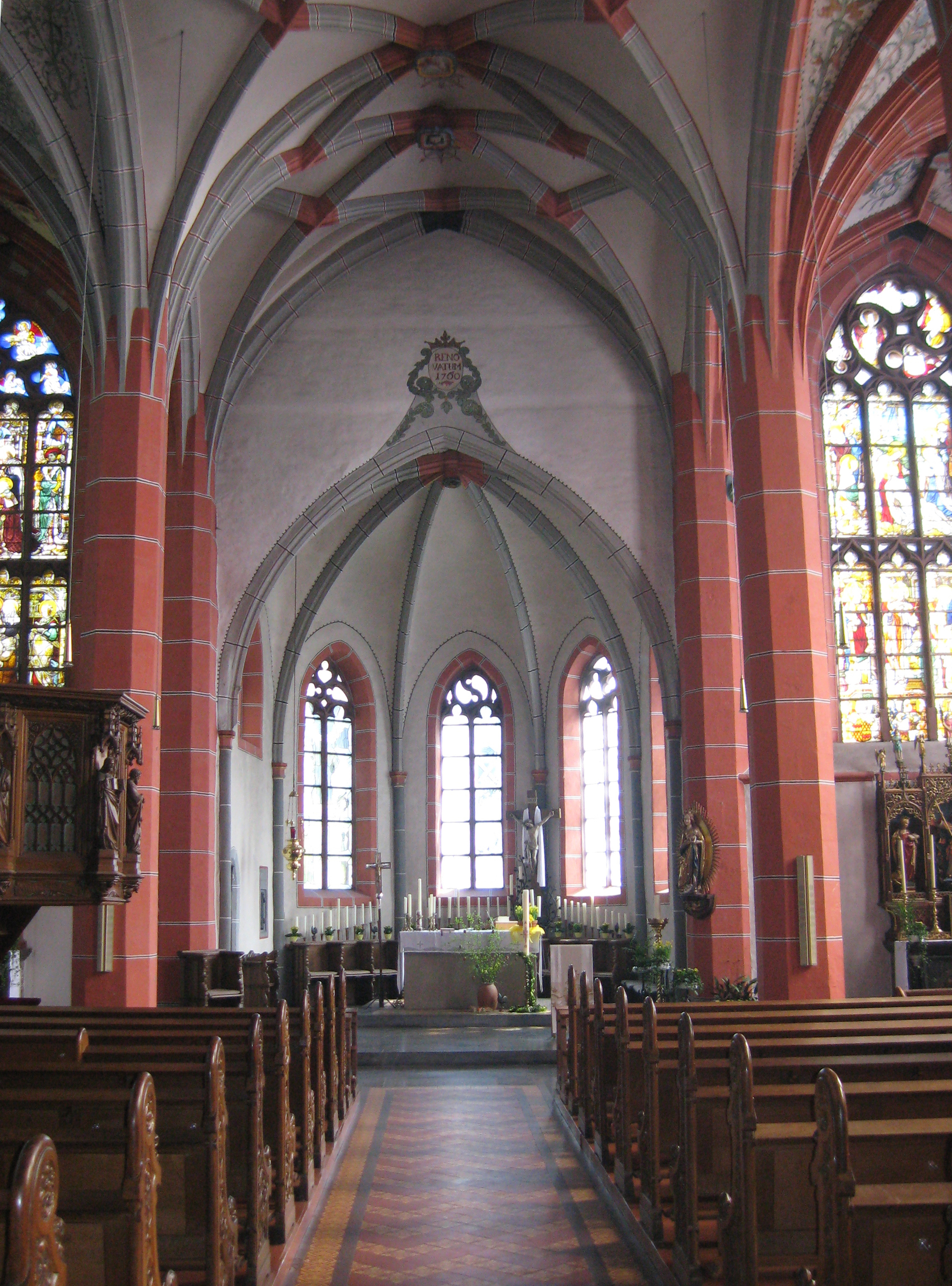 Schleiden, Schlosskirche, Mittelschiff, Chor und Apsis Datum: 25.04.2011 Urheber: M. Pfeiffer alias Benutzer:Gordito1869 Quelle: privates Fotoarchiv des Urhebers